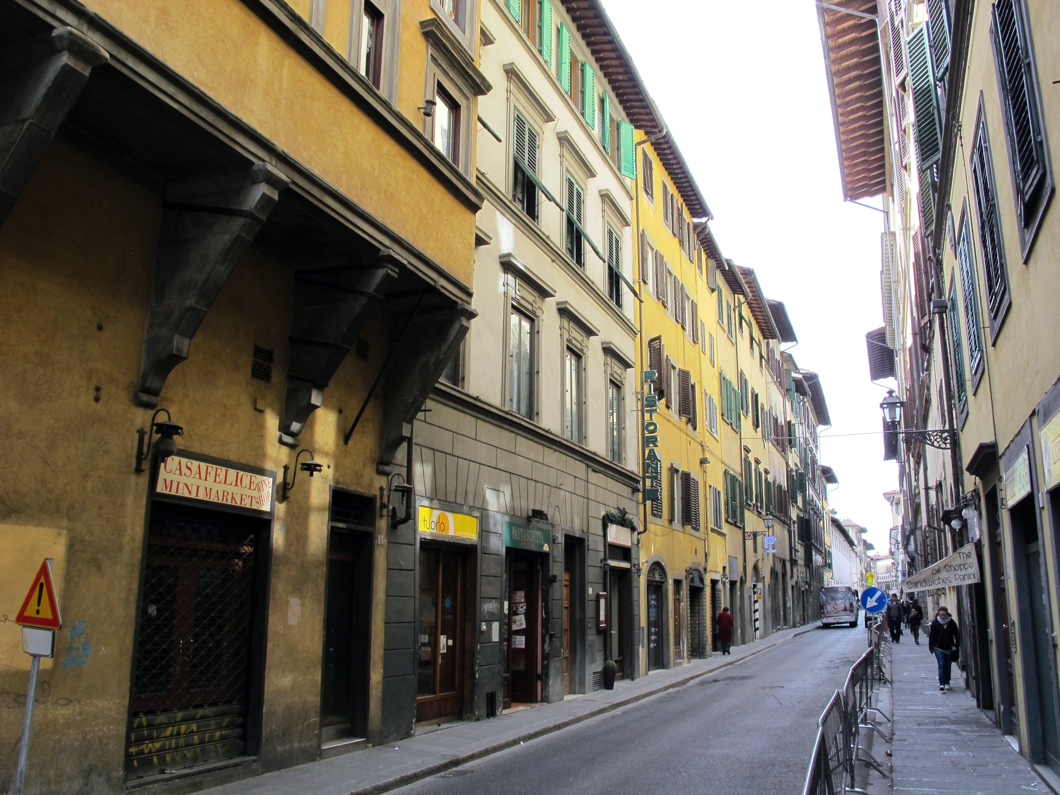 Firenze, miscellanea